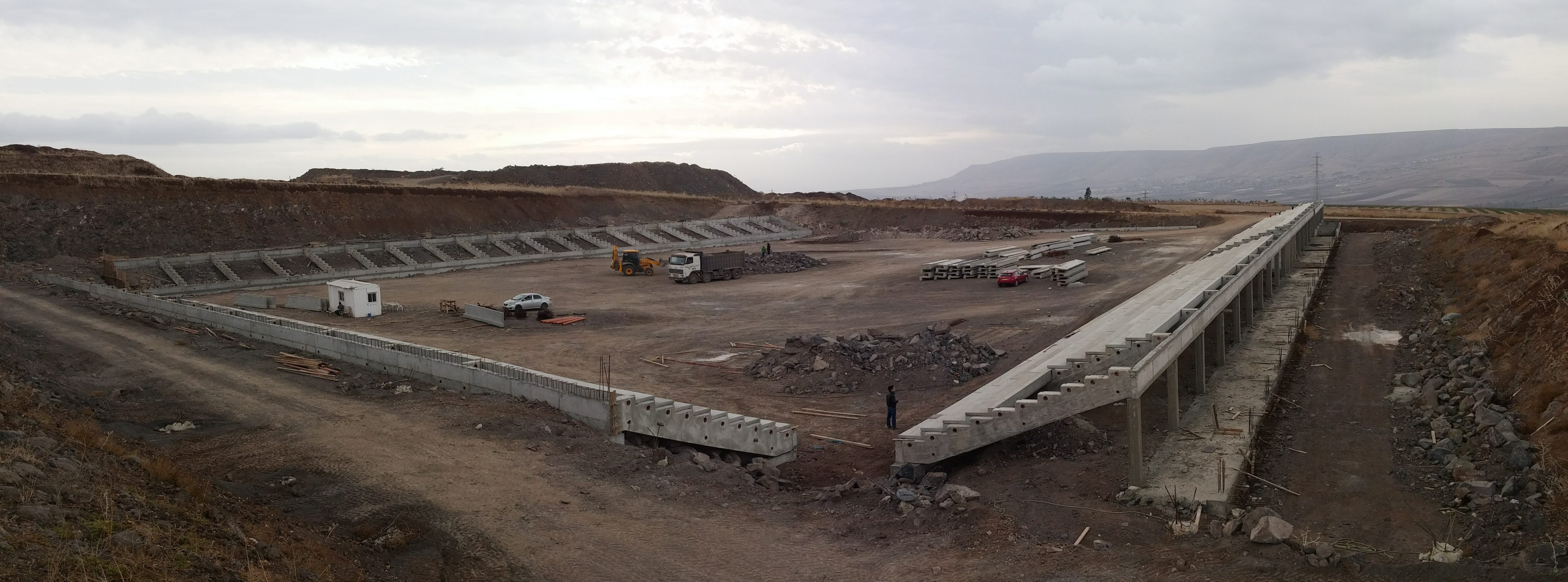 Tiberias Football Stadium